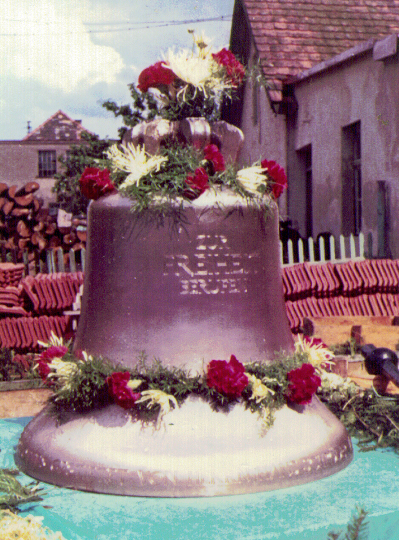 Glocke der alt-katholischen Pfarrkirche St. Peter & Paul Weidenberg - "Zur Freiheit berufen"